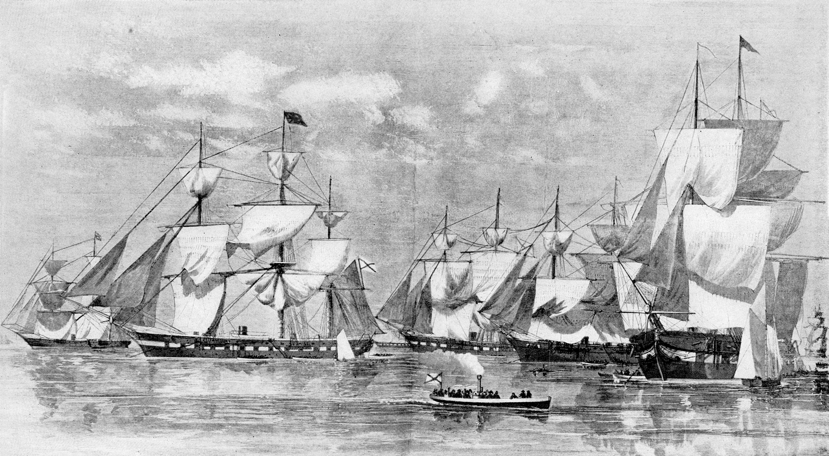 Корвет Витязь, фрегат Александр Невский, фрегат Пересвет, корвет Варяг и фрегат Ослябя в Нью-Йорке. Иллюстрация из Harpers Weekly за 17 октября 1863 года